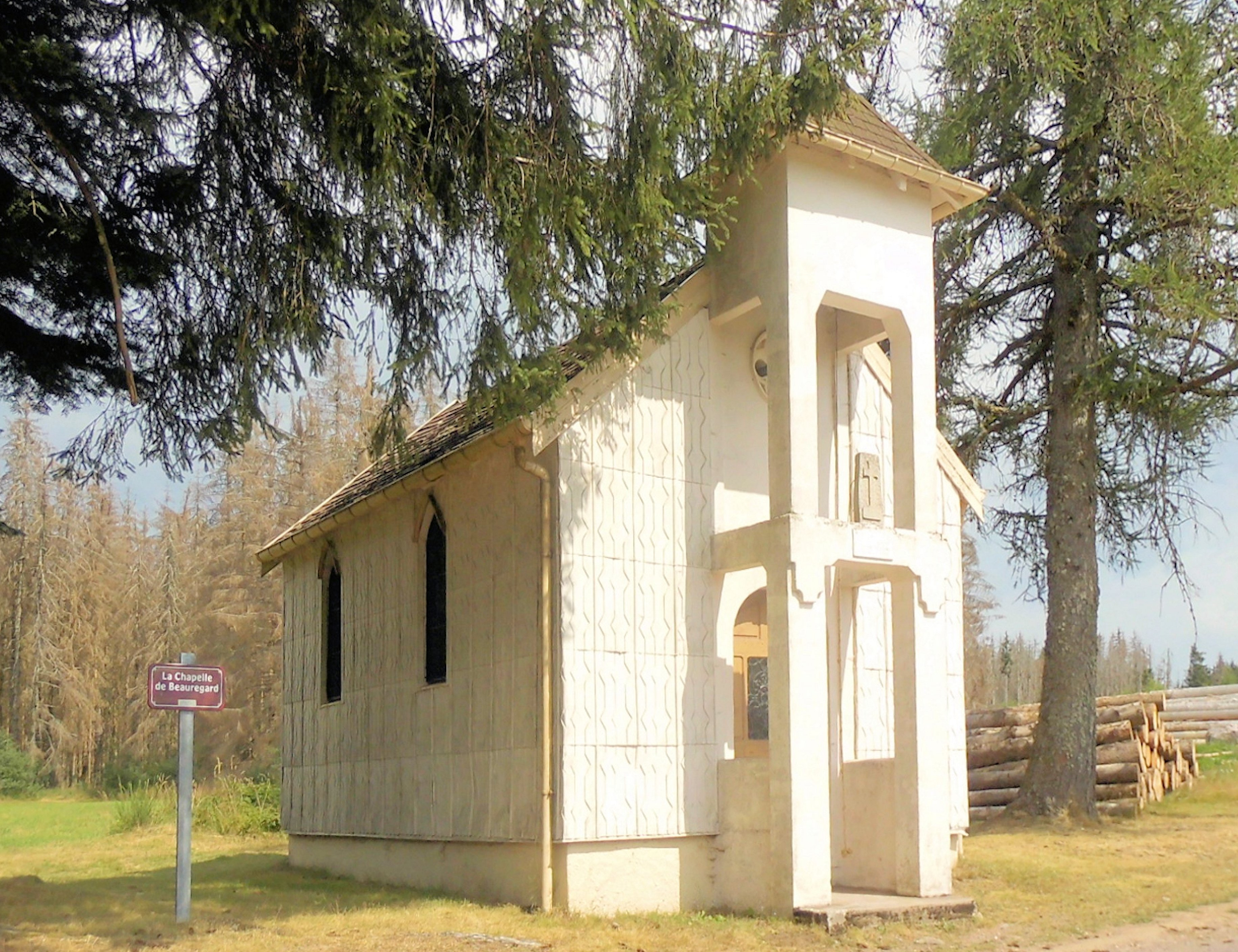 La chapelle Notre-Dame dite chapelle de Beauregard à Montagne